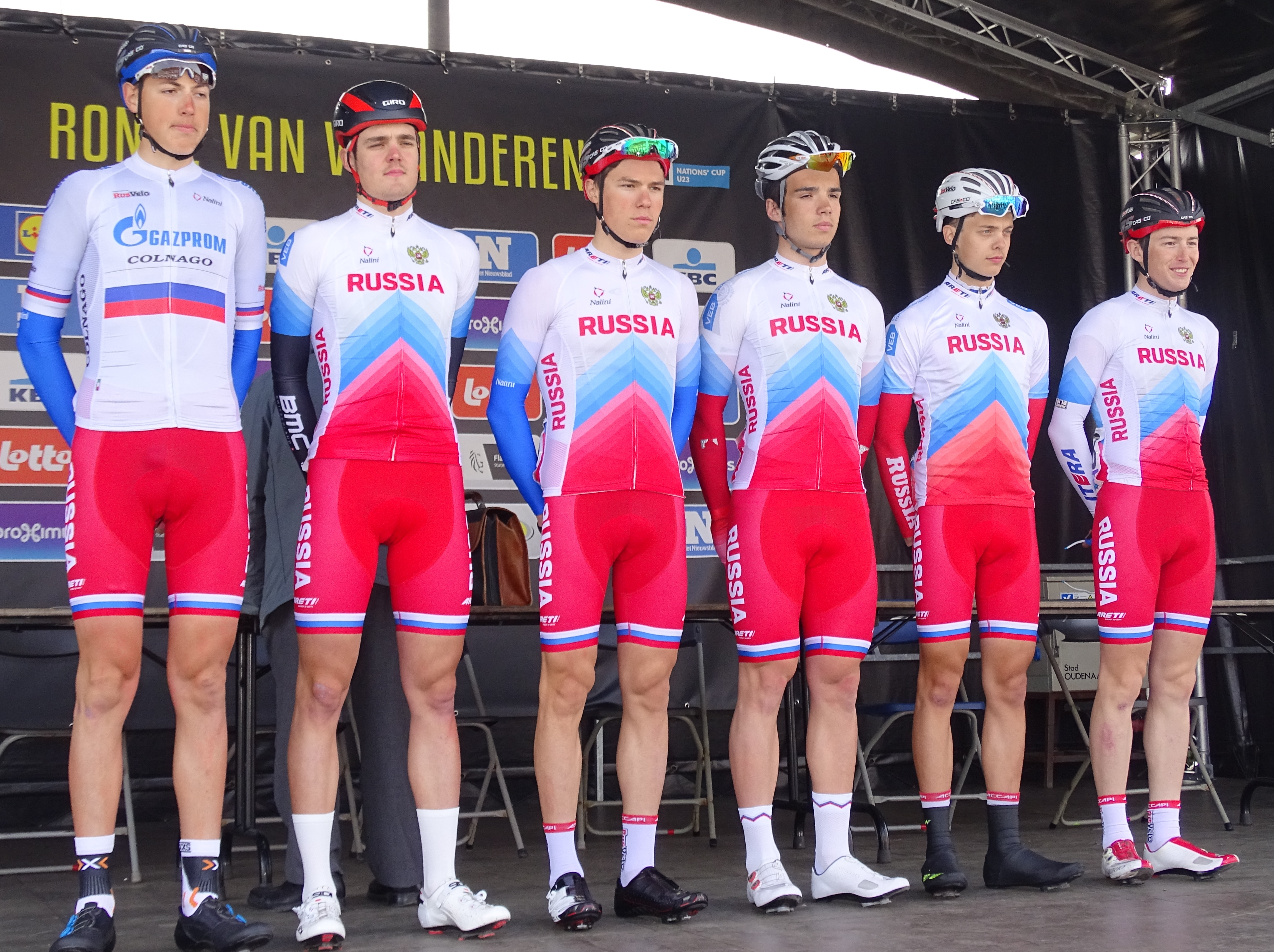 Reportage réalisé le samedi 9 avril à l'occasion du départ et de l'arrivée du Tour des Flandres espoirs 2016 à Audenarde, Belgique.